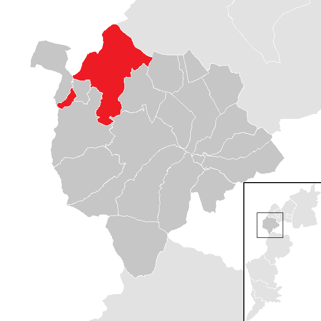 Bezirk Mattersburg